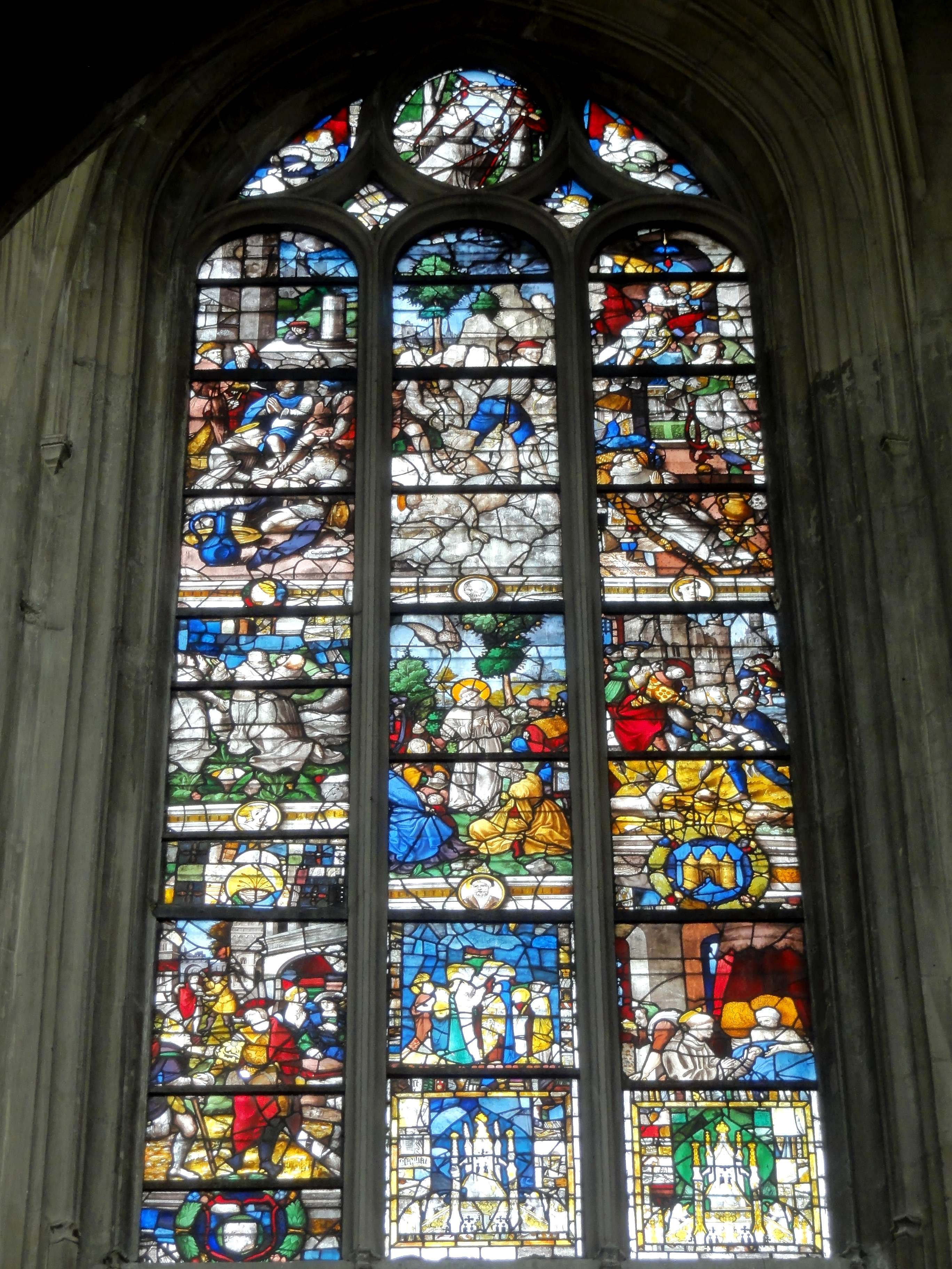 Vaisseau central, 5e travée côté nord - vitrail de la vie de saint François d'Assise.